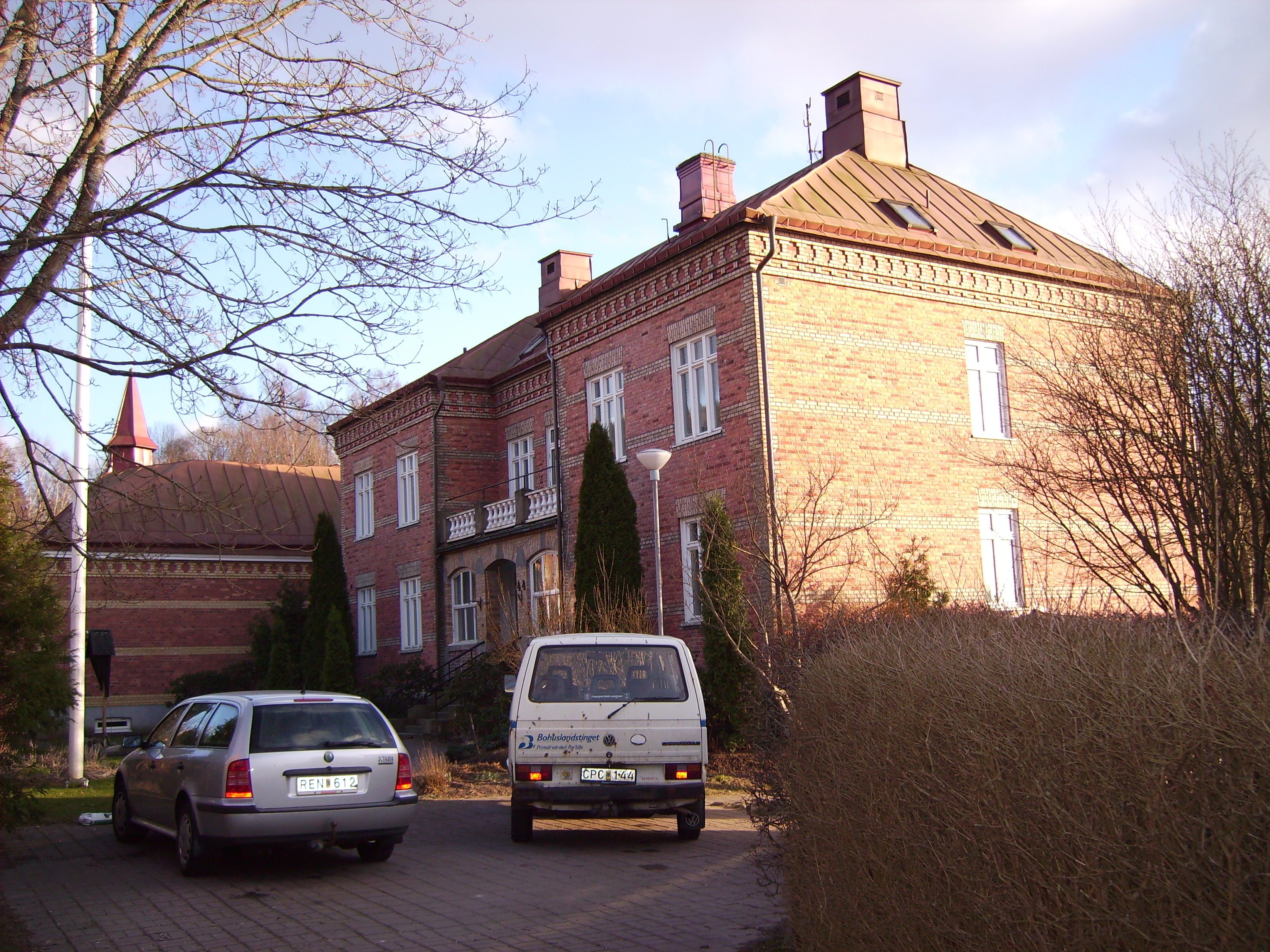 Bilden är fotograferad av Harri Blomberg. Photo by Harri Blomberg.